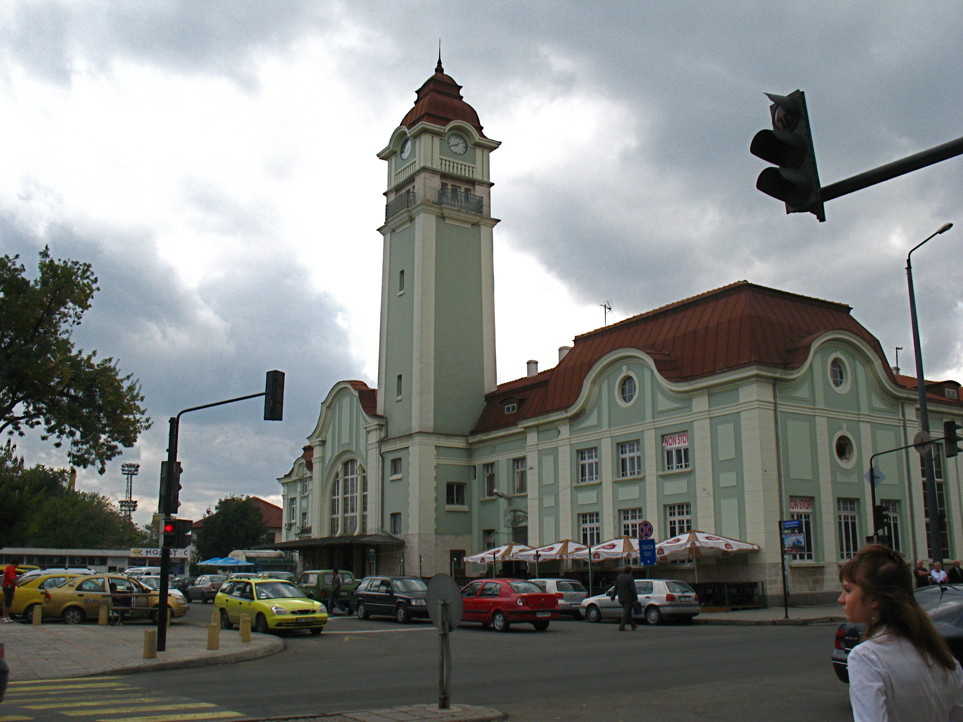 Вижте = Бургас_4241.jpg